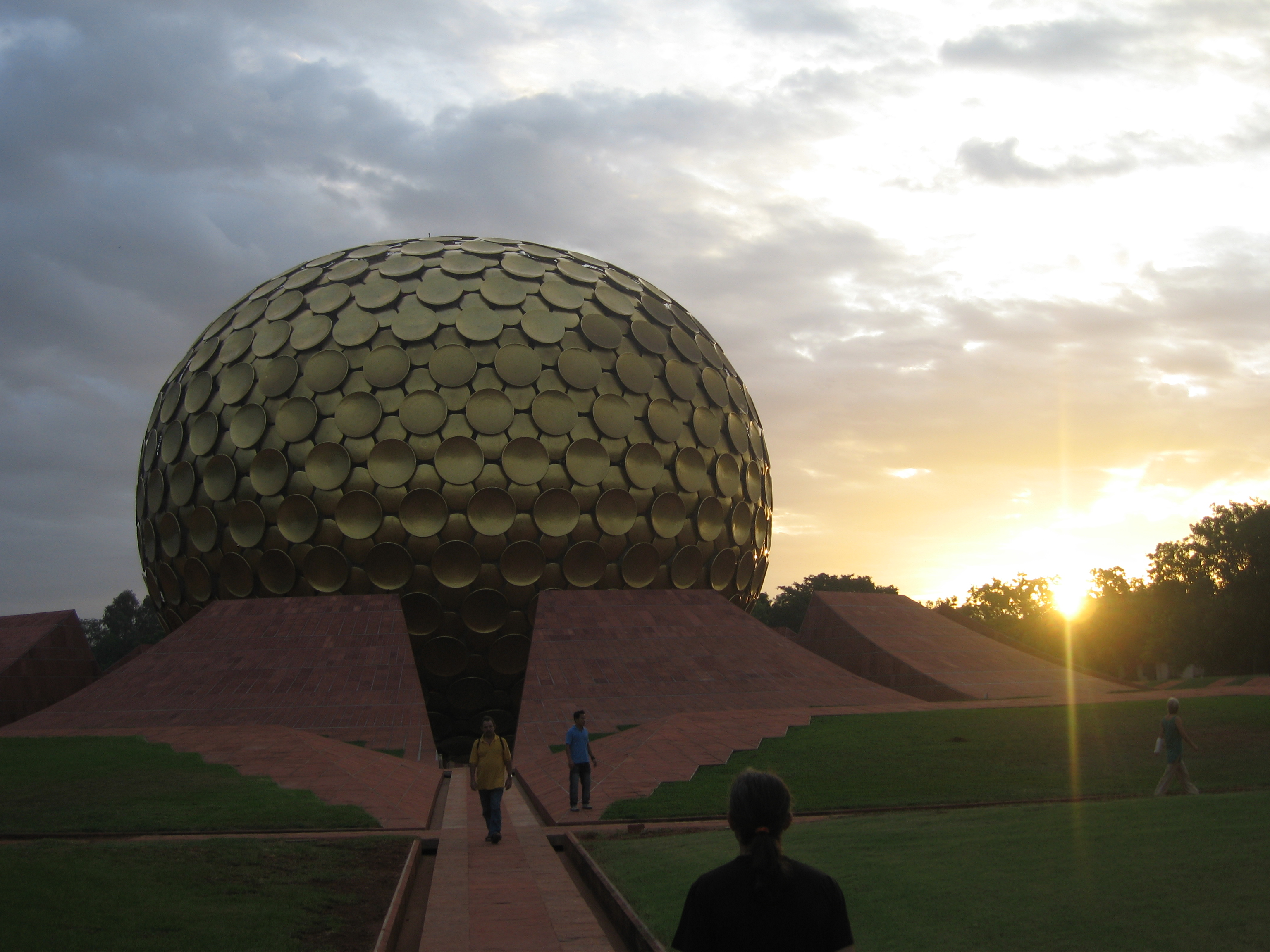 சர்வதேச நகரமான ஆரோவில்லின் ஆன்மா என்று போற்றப்படும் மாத்ரி மந்திரின் காலைநேரக் காட்சி.